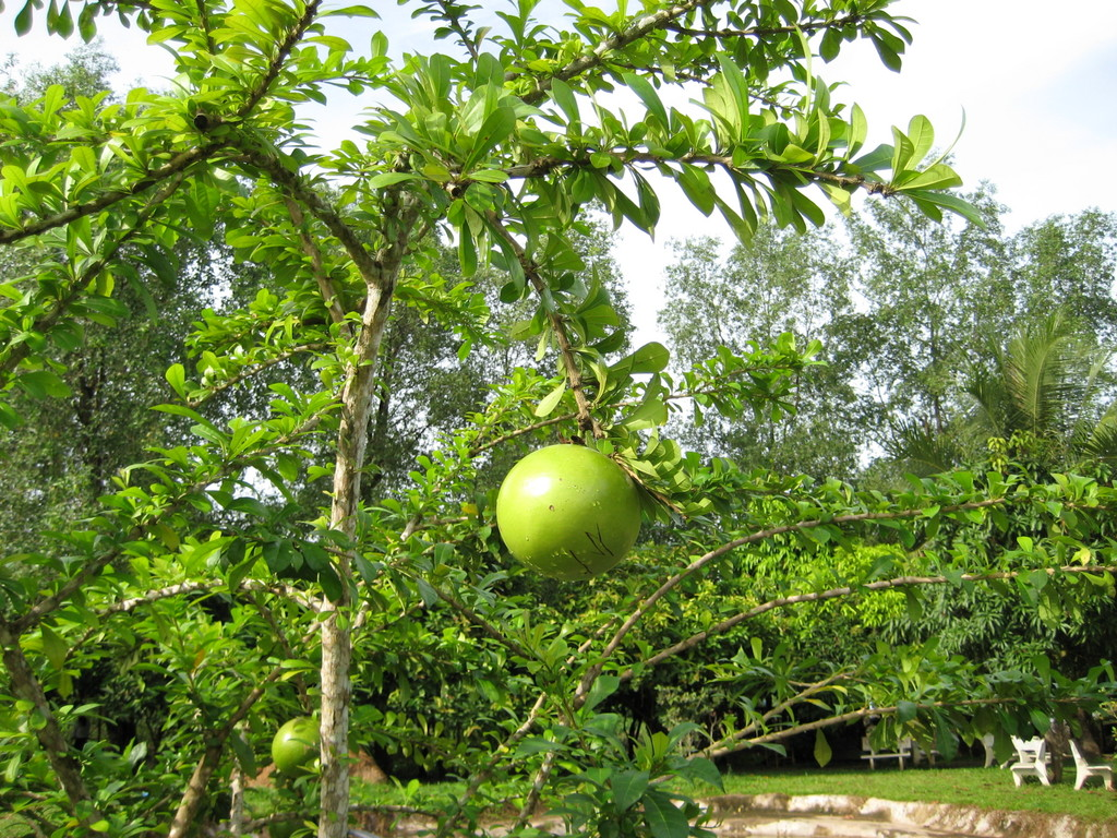 Đào tiên, có tên khoa học là Crescentia cujete Hinh do tôi chụp